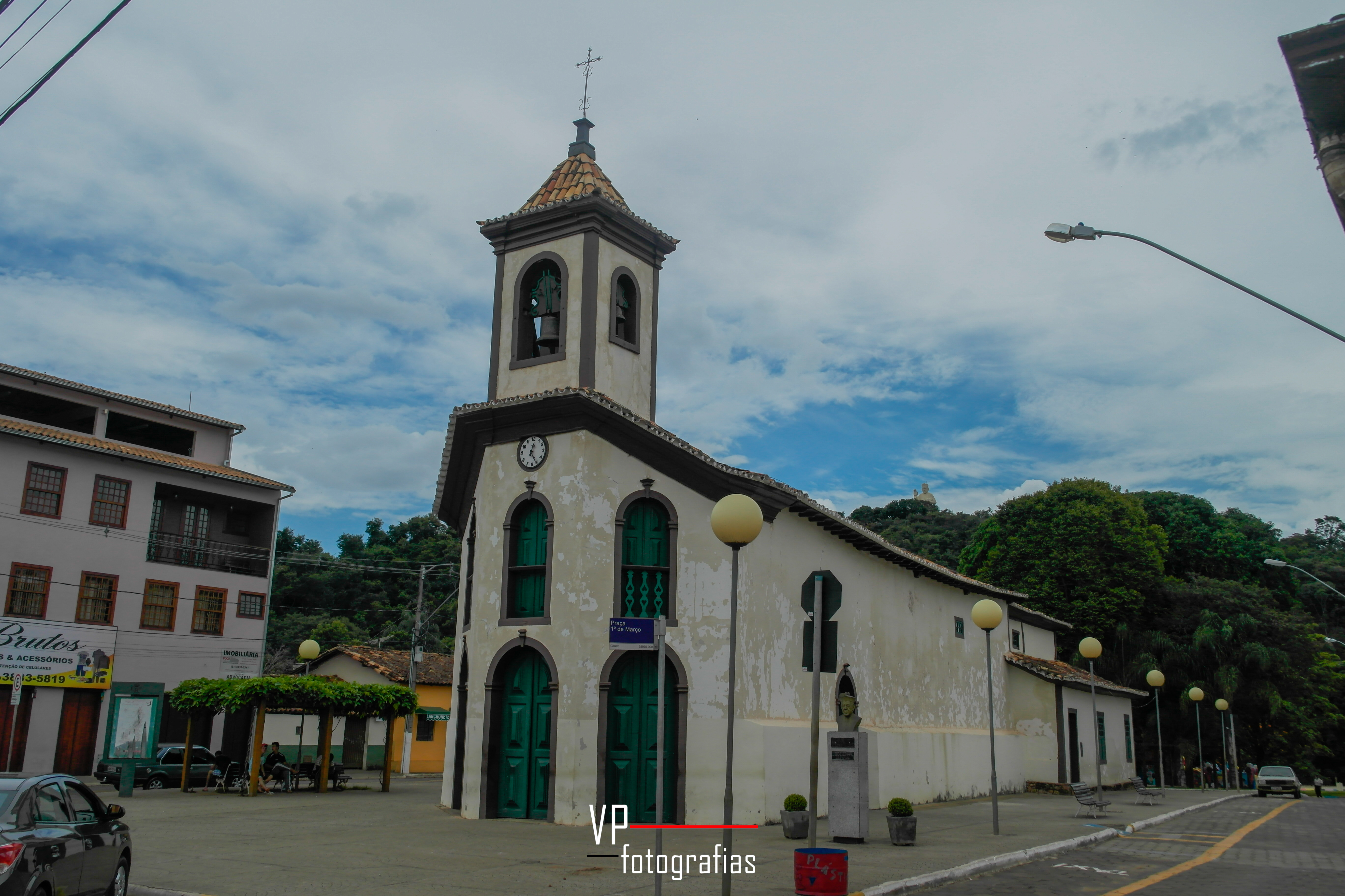 São Gonçalo do Rio Abaixo - State of Minas Gerais, Brazil